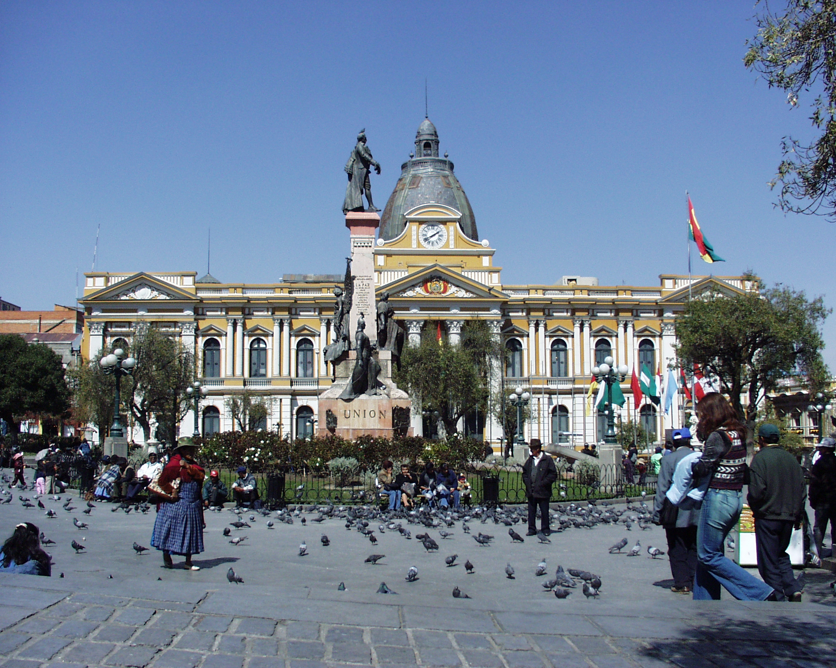 Palacio Nacional de Congreso, La Paz (Bolivia)